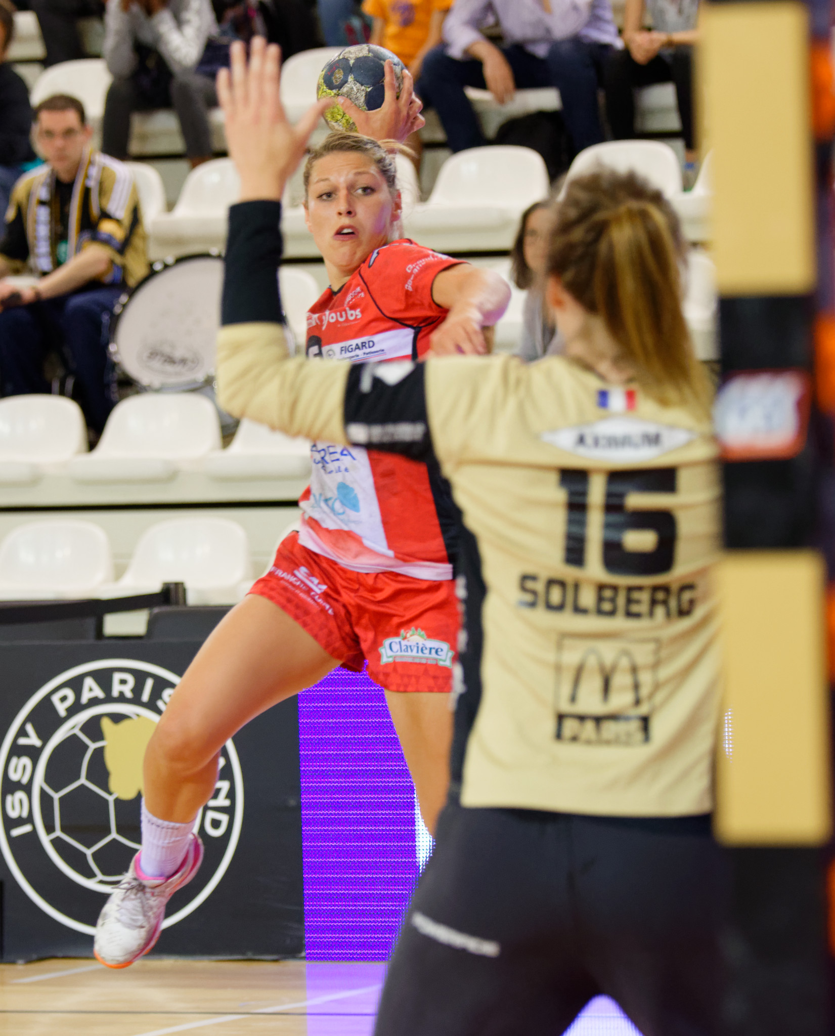 Rencontre retour de quart de finale de playoffs (place 3 et 4) entre Issy Paris Hand et ES Besançon. A Issy Les Moulineaux, le 3 juin 2017